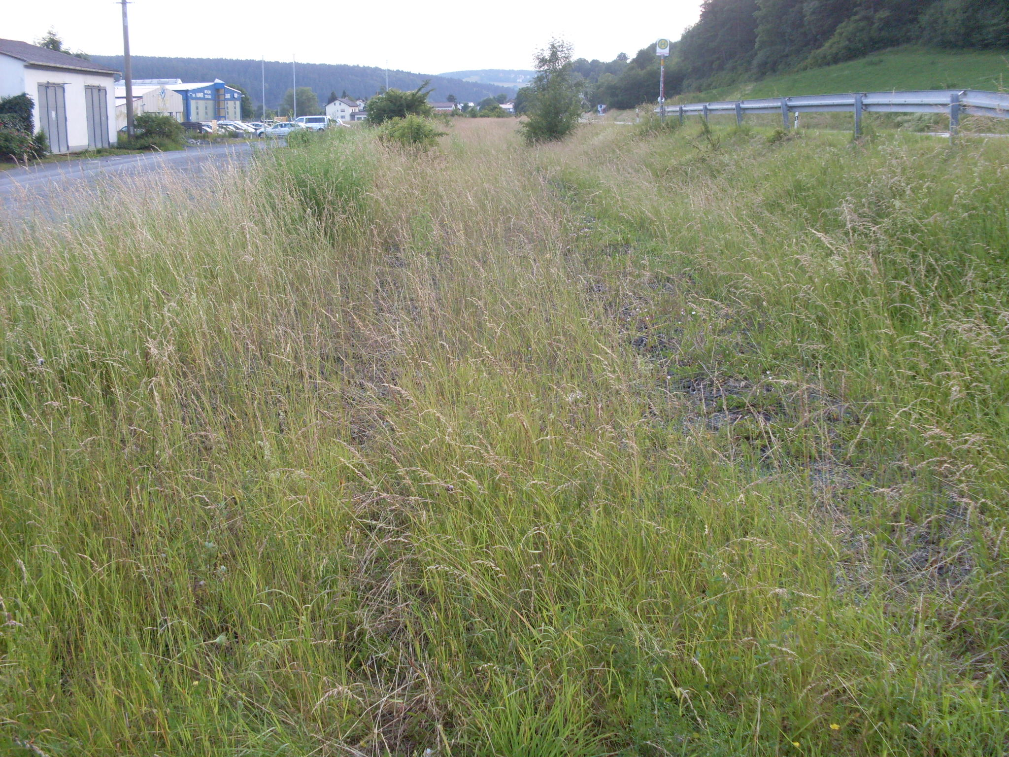 Hier befand sich der ehemalige Haltepunkt Höfles an der Rodachtalbahn.